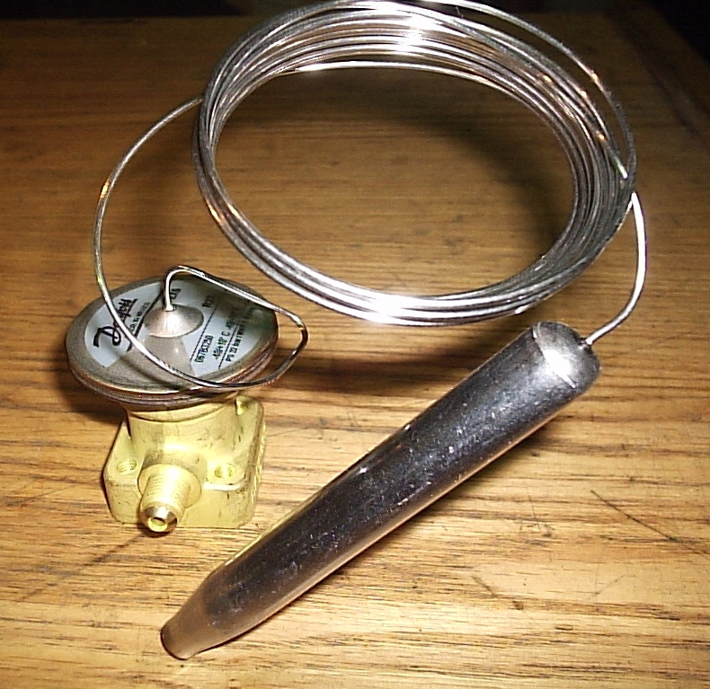 Bulbo Sensor de Temperatura -o Bulbo Remoto- de una válvula de expansión termostática TEX5 de Danfoss para R22